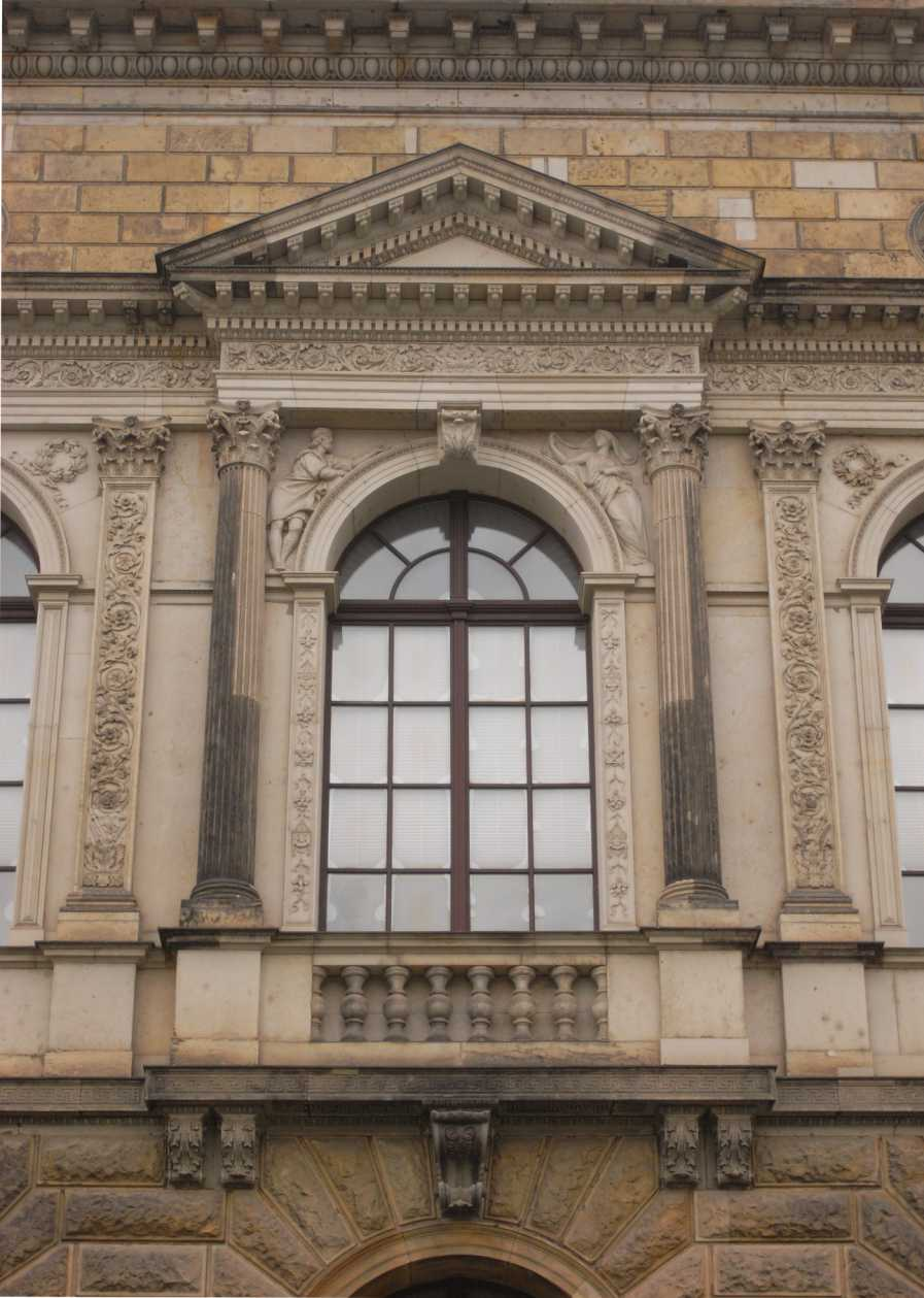 Zwinger, Dresden